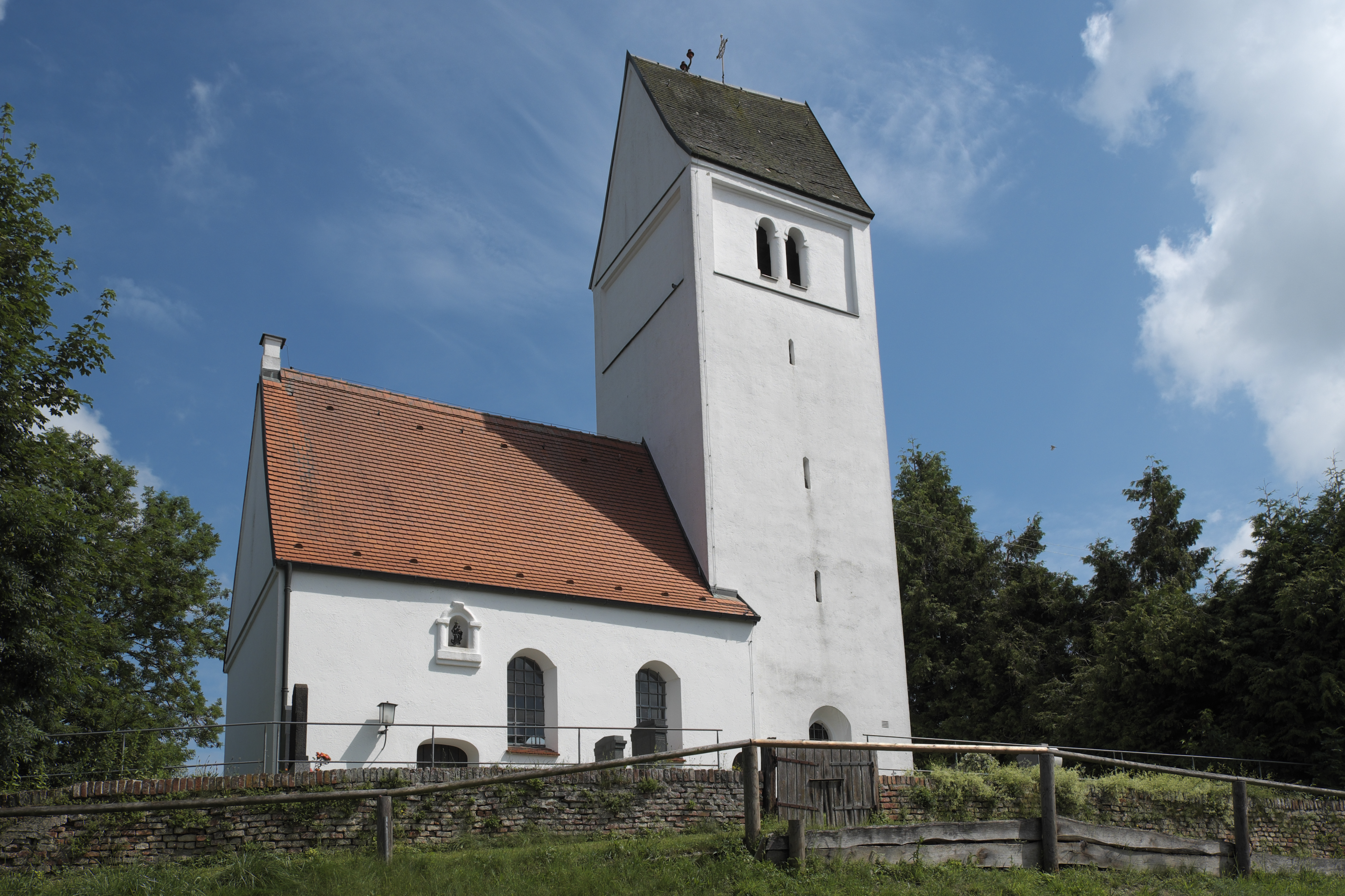 Katholische Filialkirche St. Maria (Maria Geburt) in Frauenberg, einem Ortsteil von Maisach im Landkreis Fürstenfeldbruck (Bayern/Deutschland), romanische Chorturmkirche aus dem 12./13. Jahrhundert